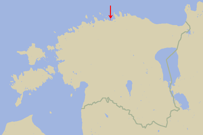 Pedassaar na mapě Estonska.